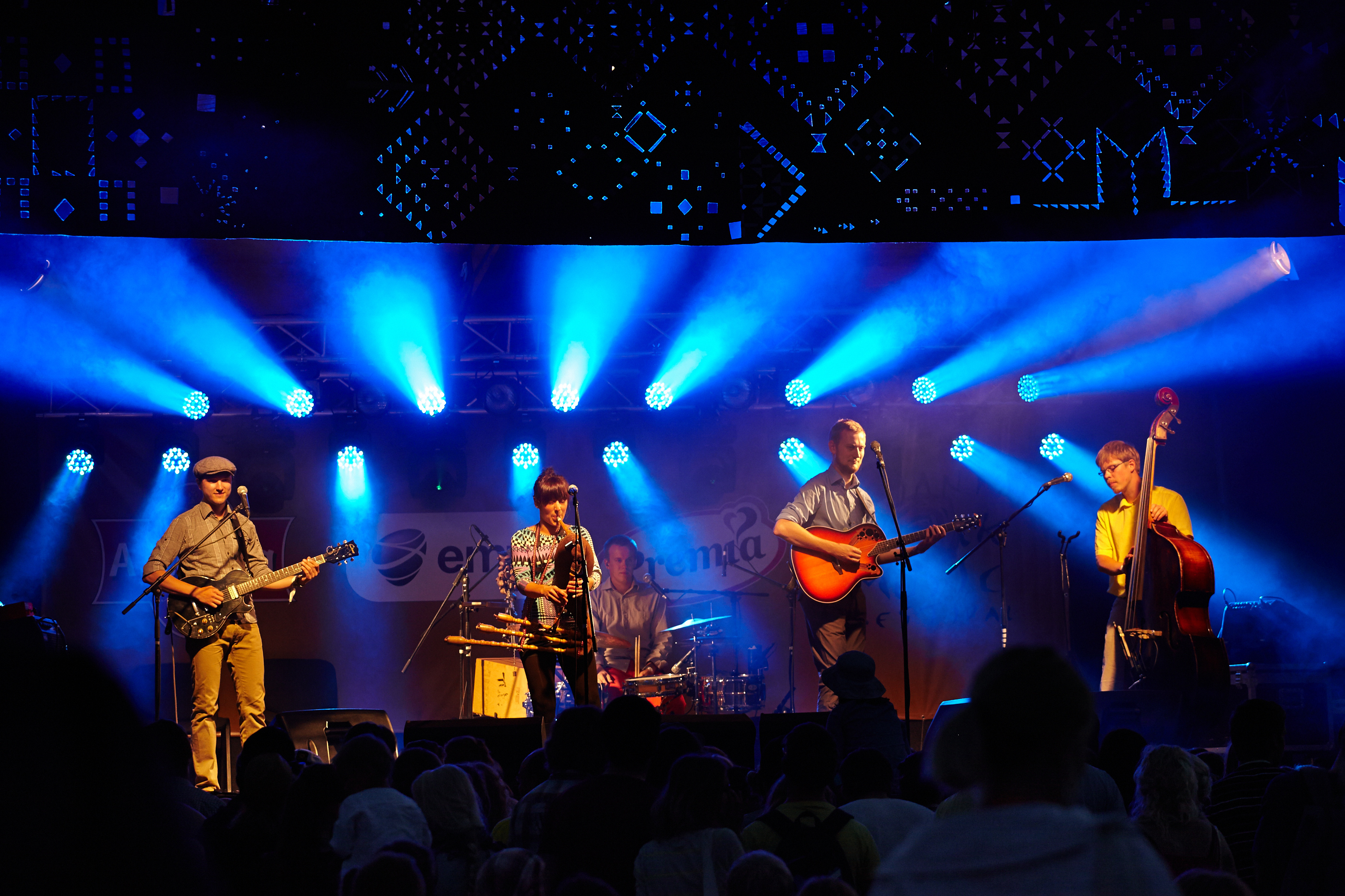 Ansambel Paabel Viljandi pärimusmuusika festivalil 2012. aasta juulis.